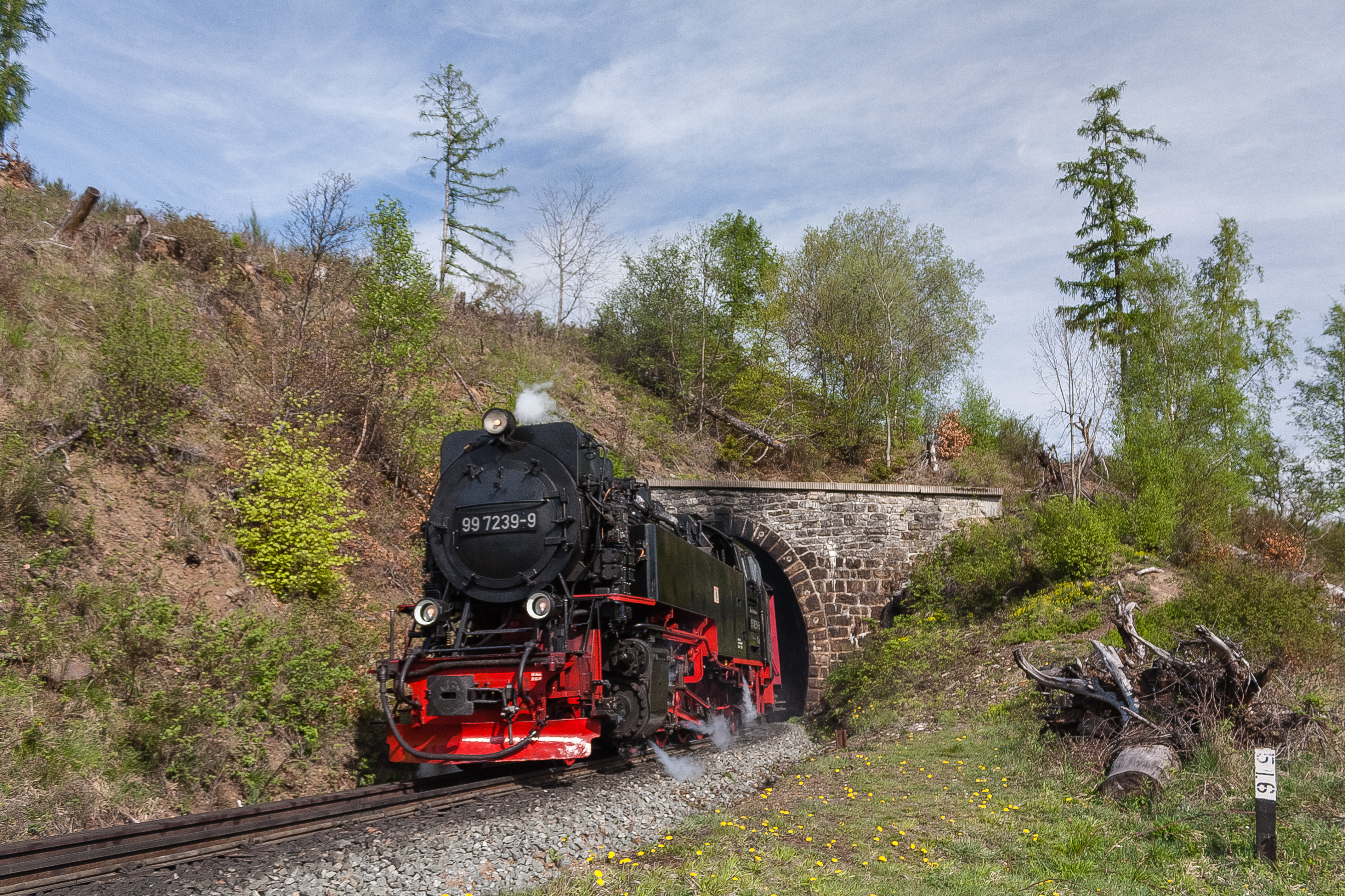 Dampfzug verlässt Thumkuhlental-Tunnel